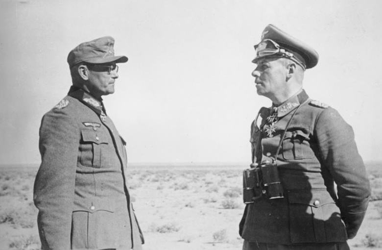 Scherl Kampf in Nordafrika: Generaloberst Rommel im Gespräch mit Generalmajor Böttcher, Kommandeur einer in Nordafrika eingesetzten Panzerdivision, der zu Weihnachten 1941 mit dem Ritterkreuz ausgezeichnet wurde. PK-Aufnahme: Kriegsberichter: Zwilling Jan. 42